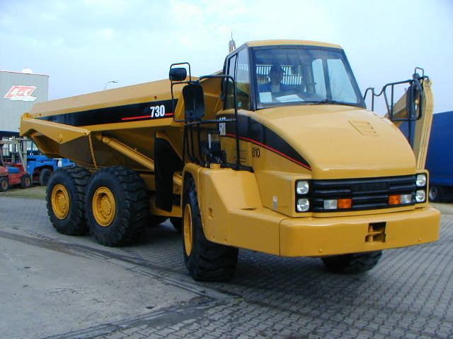 Caterpillar 730, Knickgelenk-Dumper, Gewicht 22500 kG